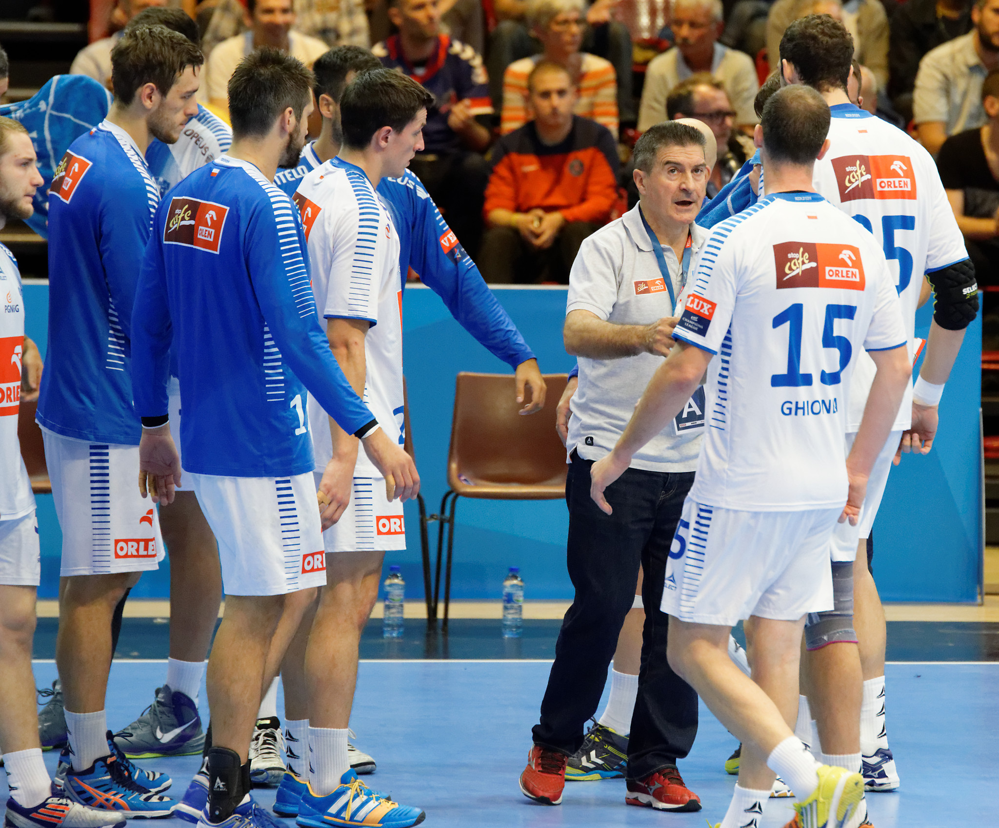 Rencontre de phase de groupe de la ligue des champions 2015-16 entre le PSG et le club polonais de Orlen Wisla Plock. A la Halle Carpentier (Paris), le 27 septembre 2015.